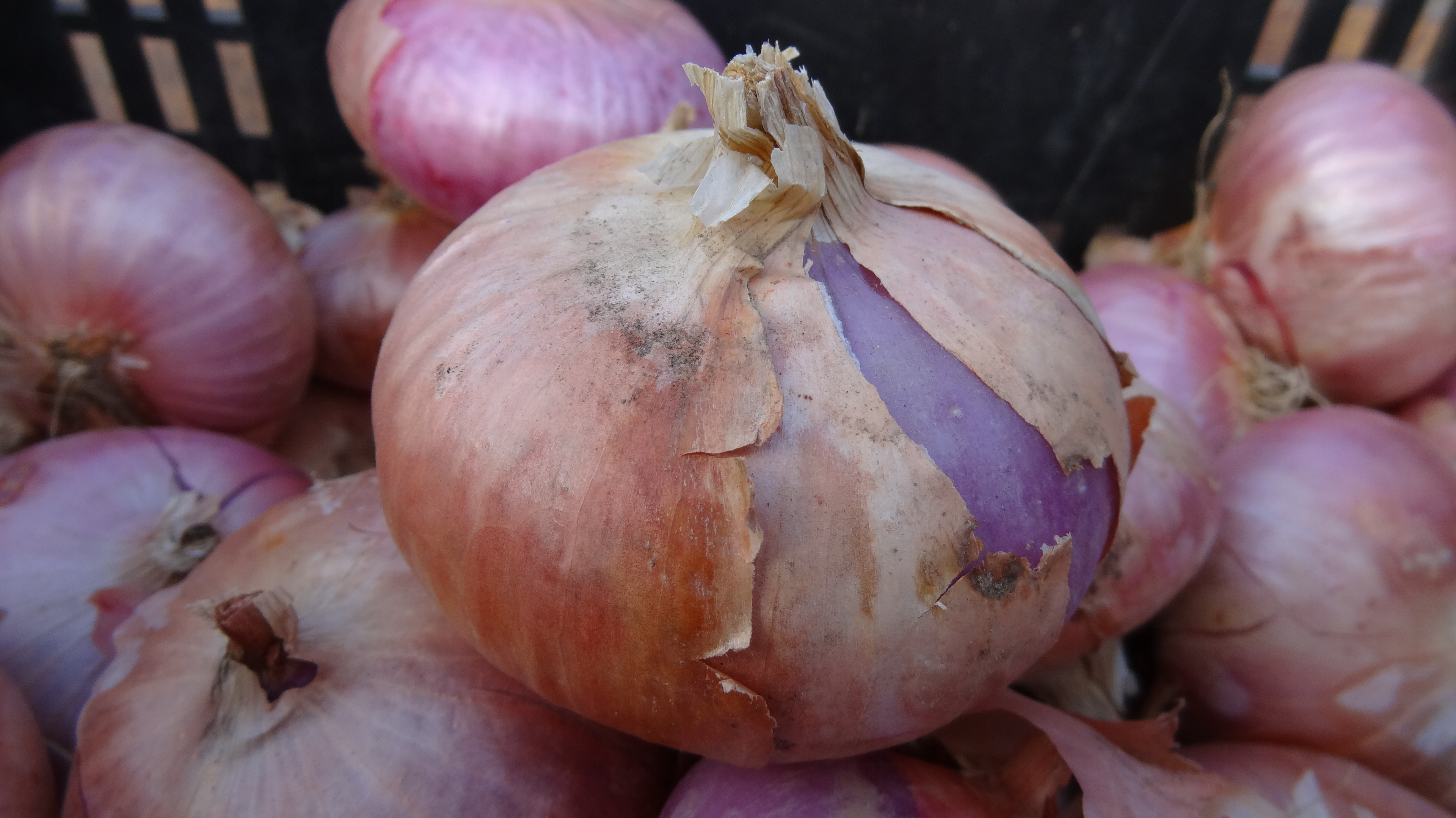 Ceba de figueres de la finca Can Bosc del Baró. Varietat de ceba típica de l'Empordà caracteritzada per la forma una mica aplanada, lleuger color lilós i gust dolç